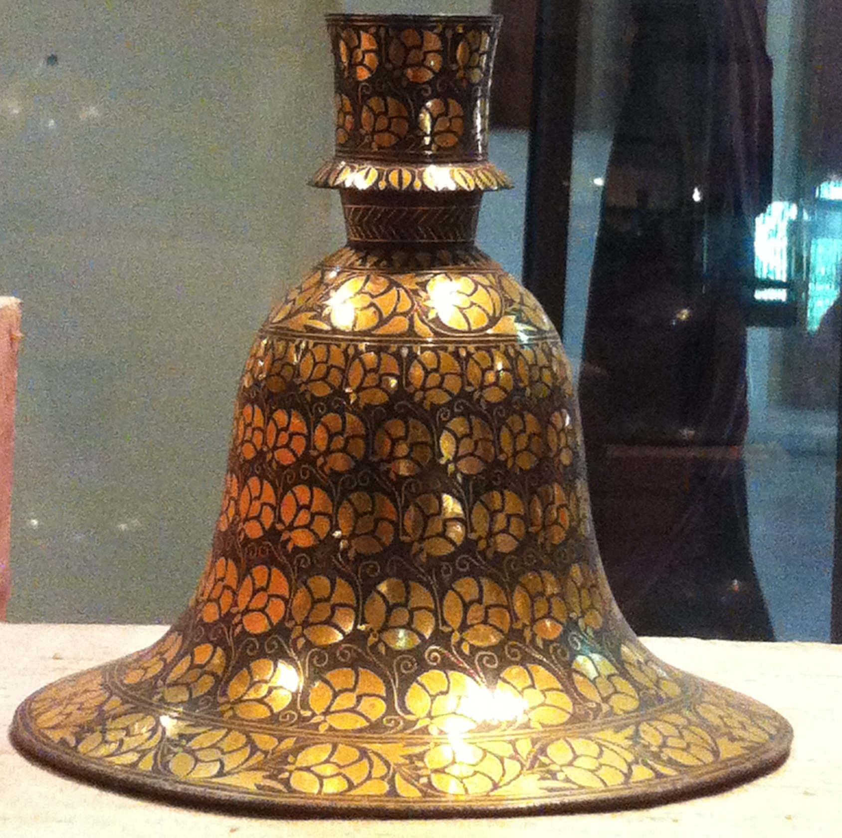 बीदरी एक लोककला है जो की कर्नाटक के बीदर शहर से शुरु हुआ था । और बाद मे धीरे-धीरे इस कला का उपयोग आन्ध्र प्रदेश के हैदराबाद शहर मे भी होने लगा ।